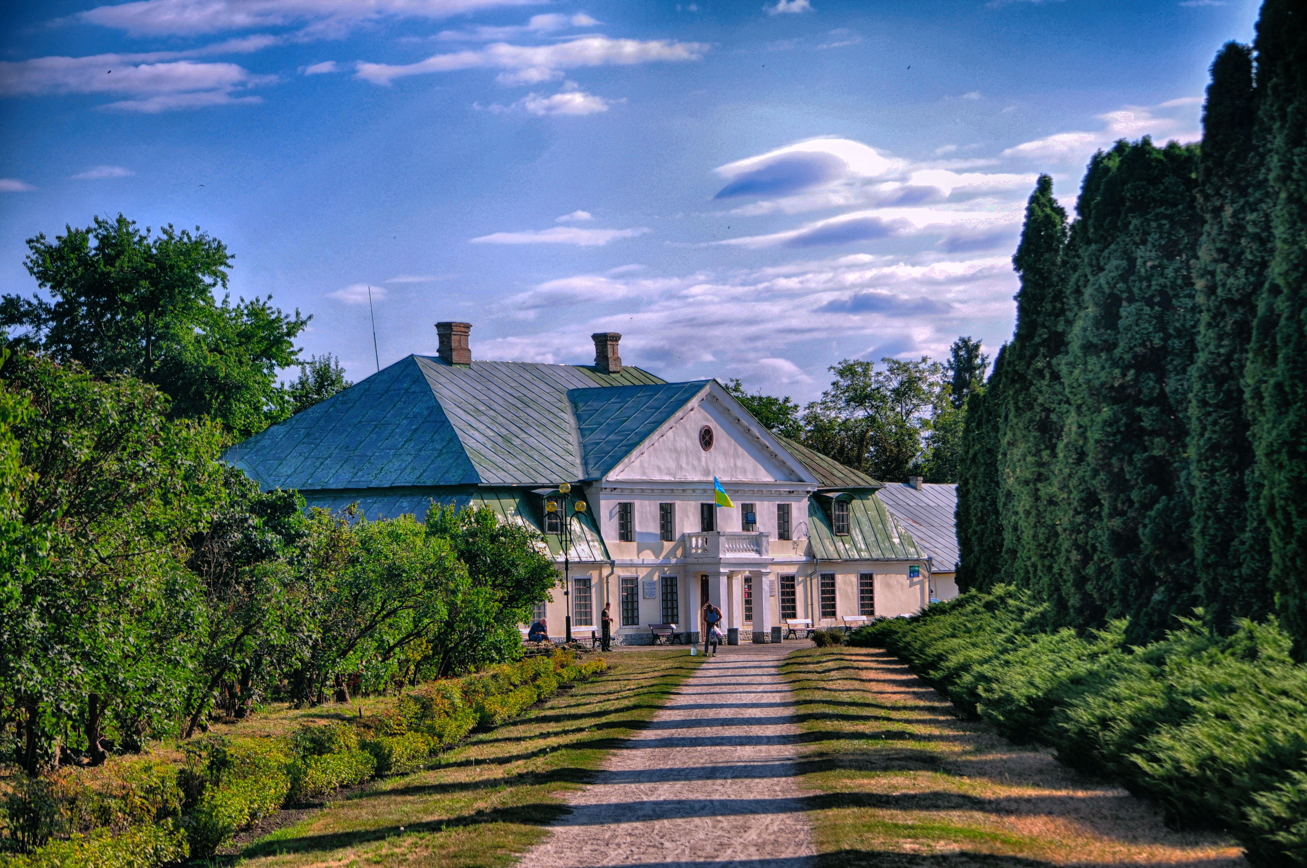 Парк «Олександрія» та паркові споруди, Біла Церква, Сквирське шосе